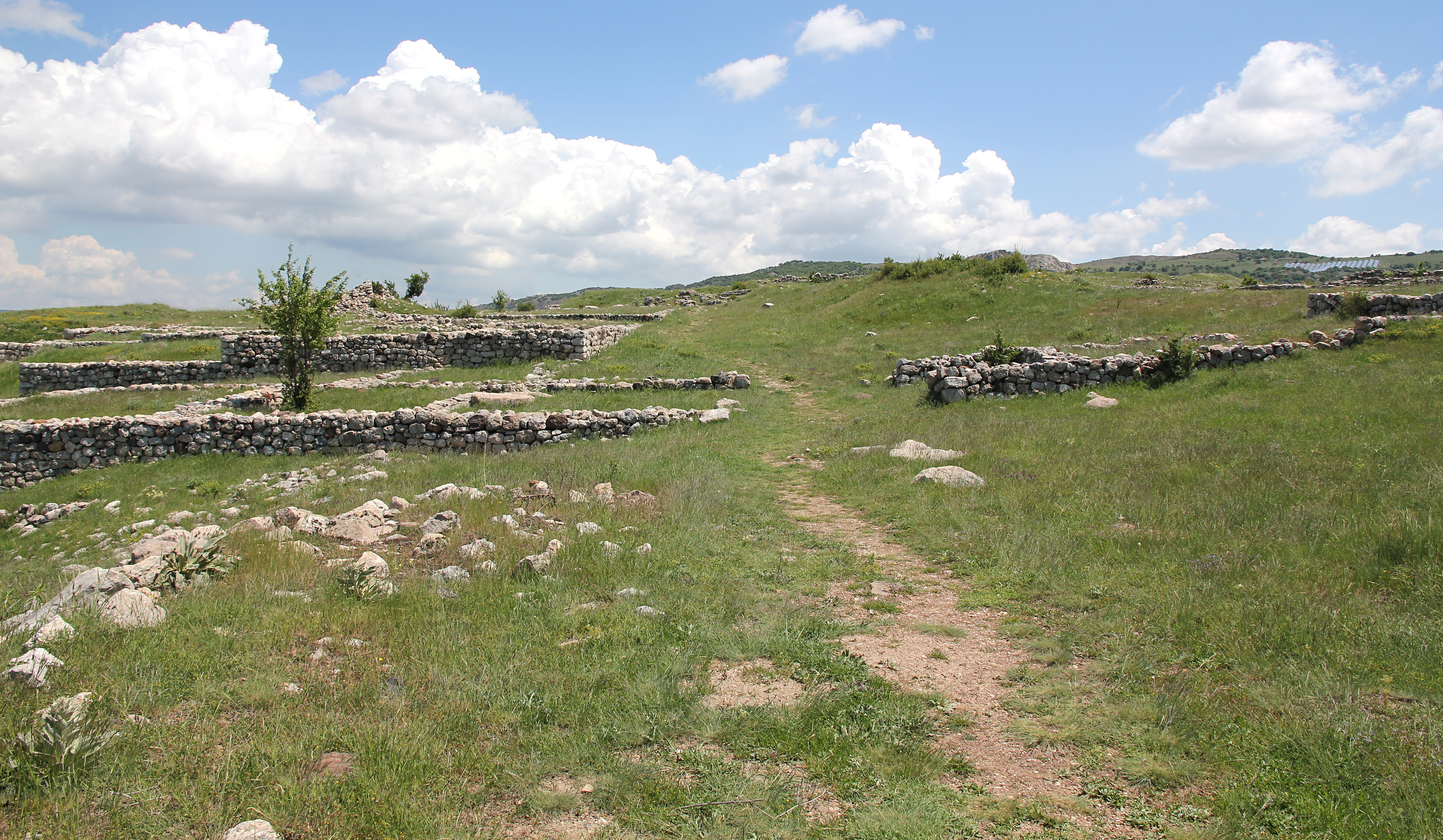 Büyükkale, die Zitadelle der hethitischen Hauptstadt Hattuša bei Boğazkale, Zentraltürkei, Tor zum unteren Burghof